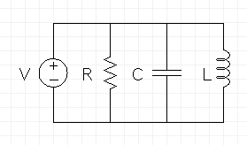 Myndin sýnir einfalda rafrás, eða svokallaða RCL rás. Undirritaður er höfundur skrárinnar og afsalar sér hér með öllum rétti gagnvart henni. -Sævar Öfjörð 00:51, 6 desember 2006 (UTC)